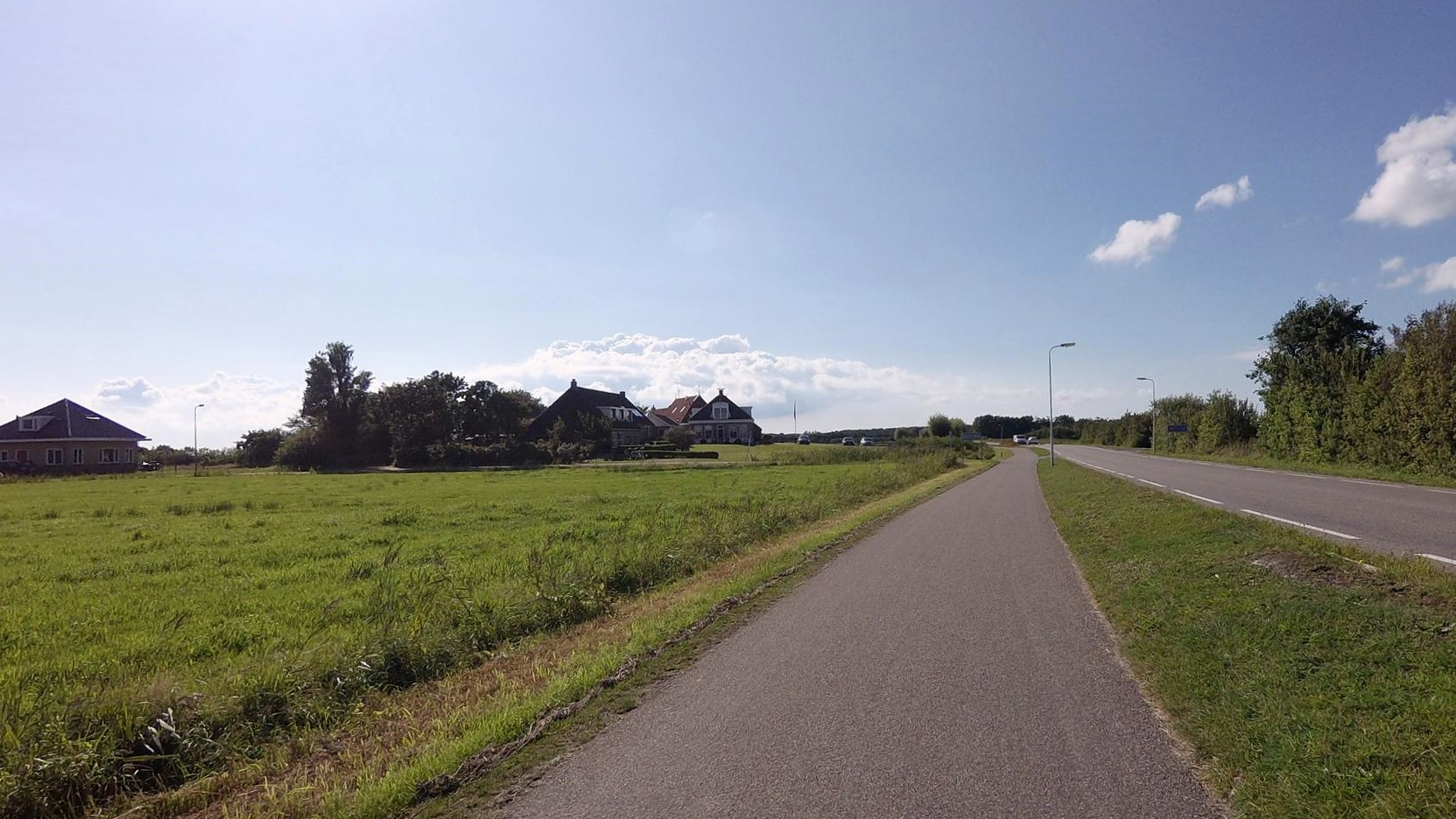 Kaard Terschelling